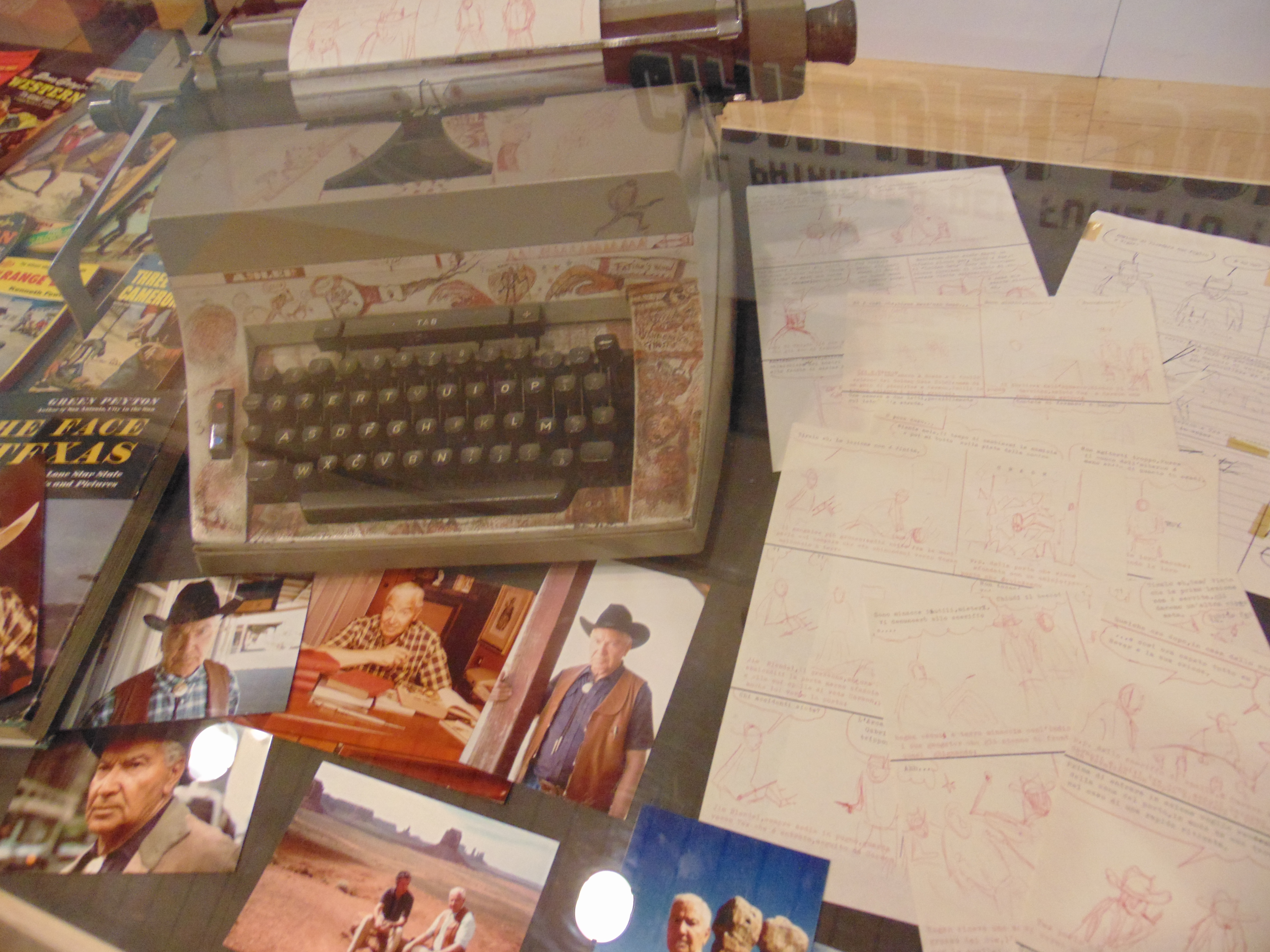 Tex - 70 anni di un mito @ Arf! Festival 2019